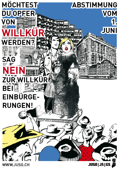 Flyer der Jungsozialistischen Partei der Schweiz zur Einbürgerungsinitiative vom 1. Juni 2008